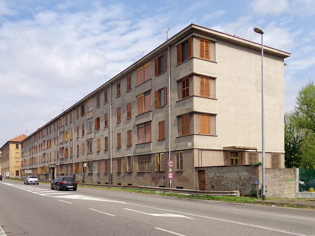 Rozzano, casa operaia “Al Bissoncello”, in via Pavese 141 (tratto urbano della SP ex SS 35 “dei Giovi”). Fu costruita dal 1929 al 1930 su progetto di Enrico Agostino Griffini e Giovanni Manfredi in stile razionalista.